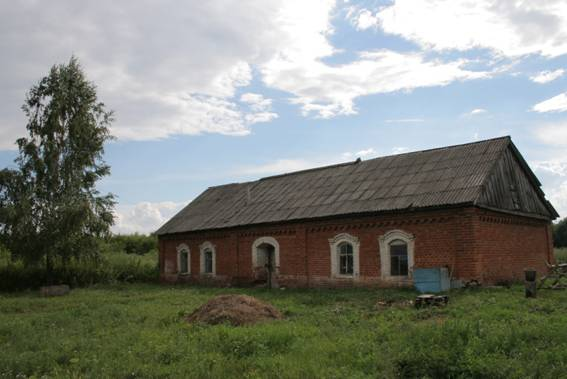 Тамбовская область, поселок Коммуна